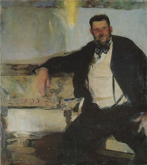 Portrait of Jan Stanisławski (1860-1907).label QS:Len,"Portrait of Jan Stanisławski (1860-1907)." label QS:Lpl,"Portret Jana Stanisławskiego (1860-1907)." label QS:Luk,"Портрет Яна Станіславського (1860-1907)."